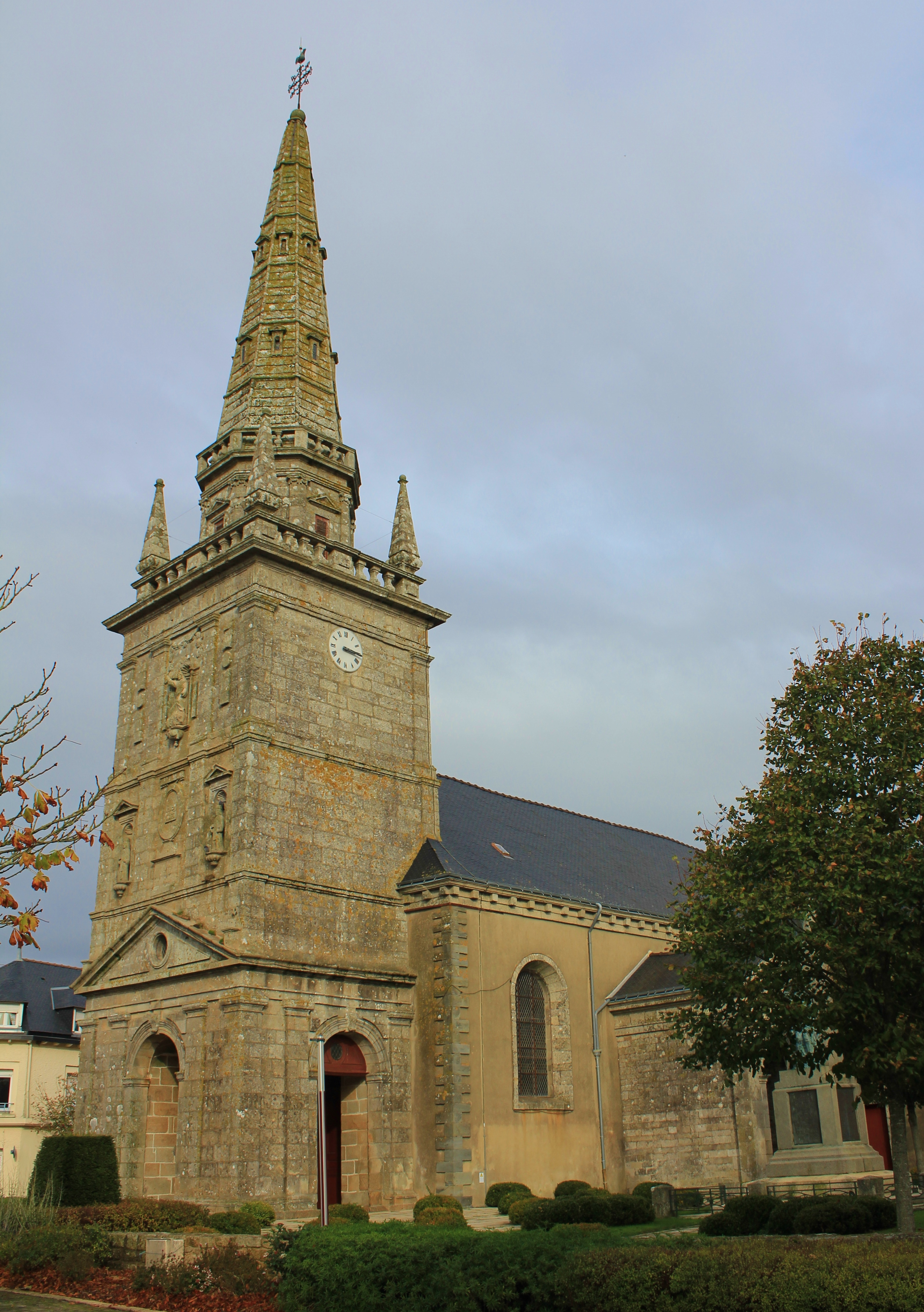 Église Saint-Côme-et-Saint-Damien (Naizin) : vue générale